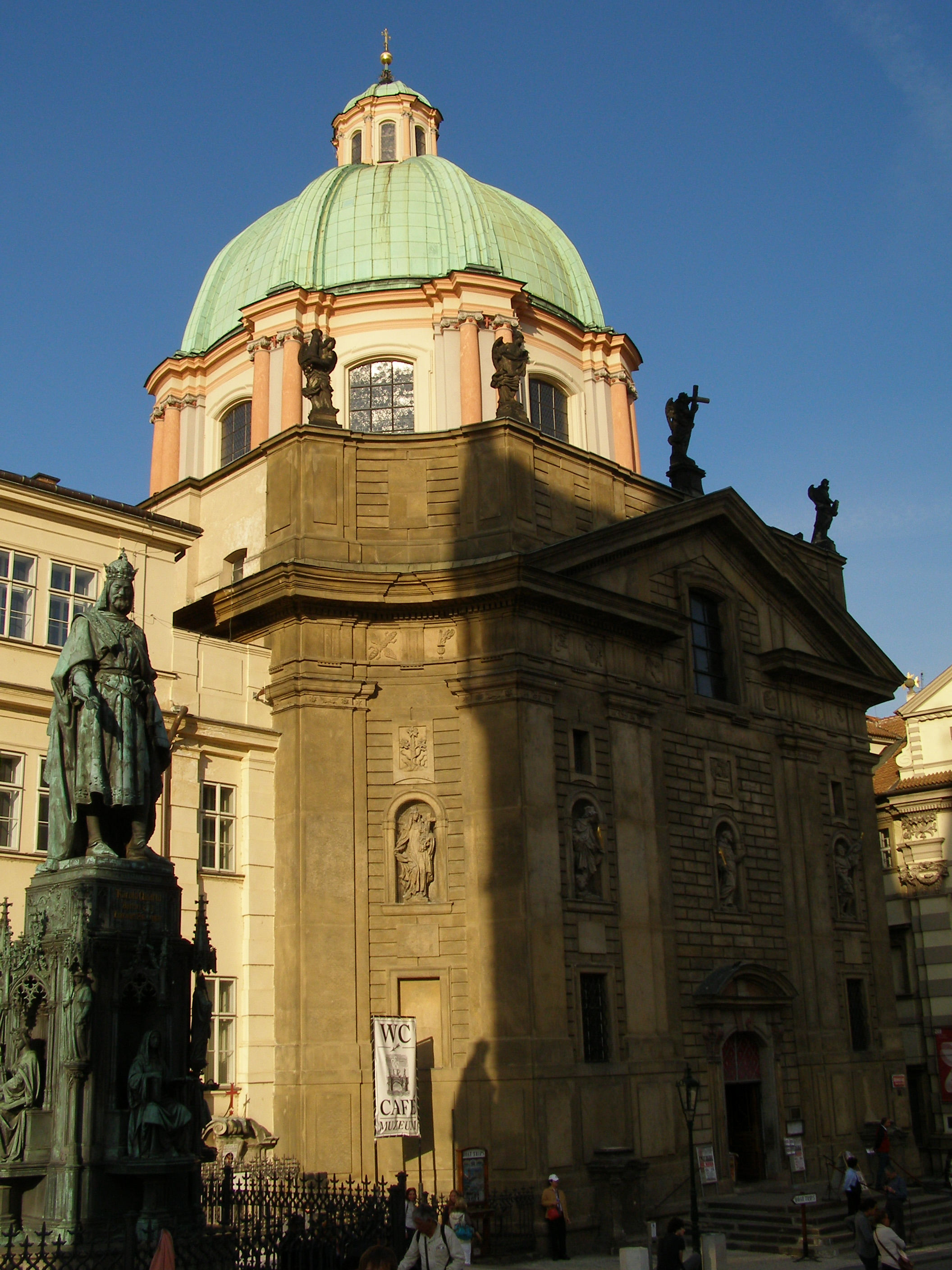 Klášter křižovníků s červenou hvězdou (Staré Město), Praha 1, Křižovnické nám. 191/3, Staré Město